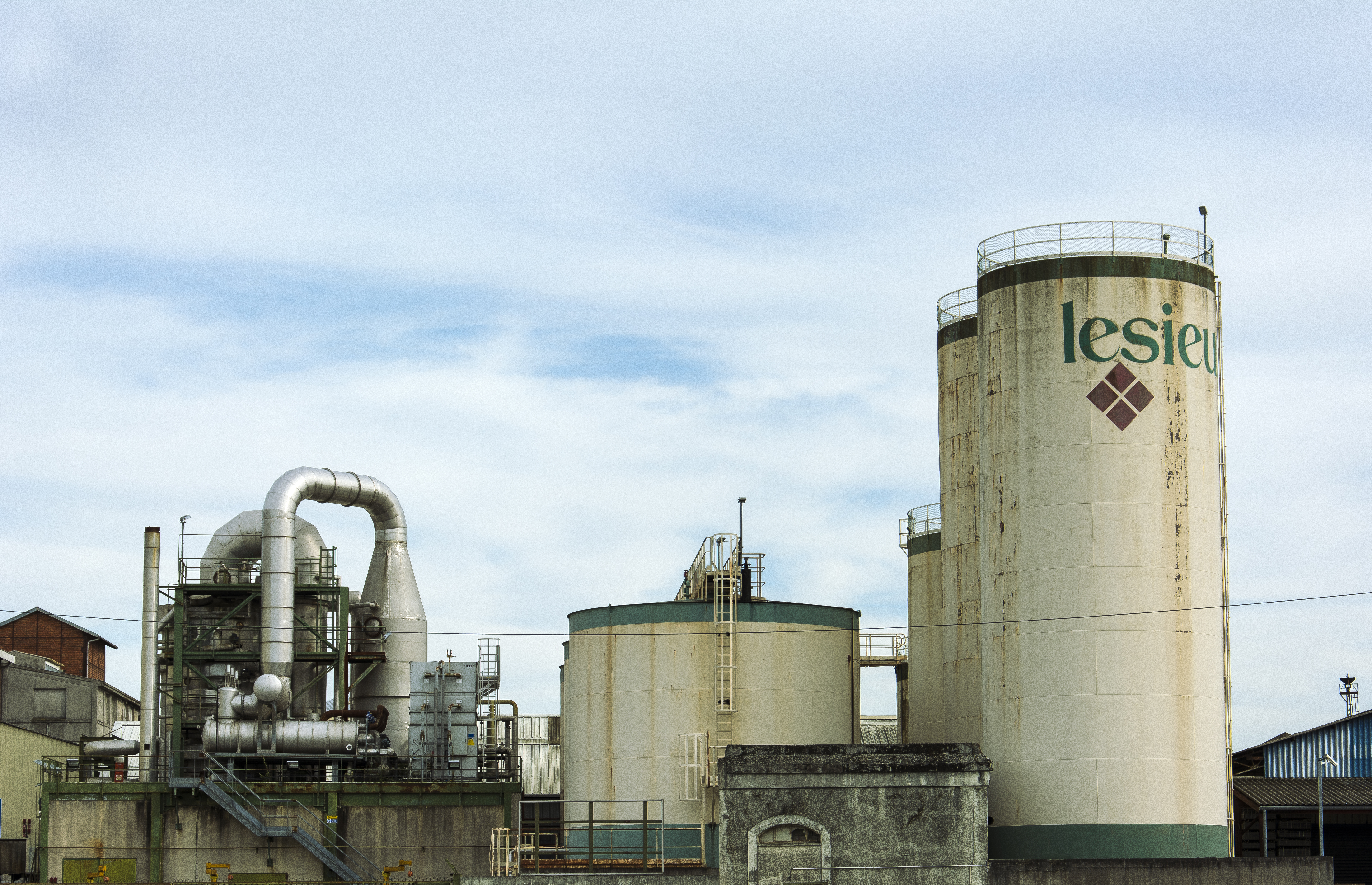 Photographie de silos de stockage de l'usine Lesieur de Bordeaux Bacalan en 2014.